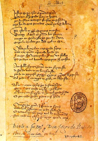 Pero López de Ayala, Rimado de Palacio, Manuscrito E (escurialense) h-III-19. Corresponde a las estrofas 12 a 17 (versos 45 a 68)